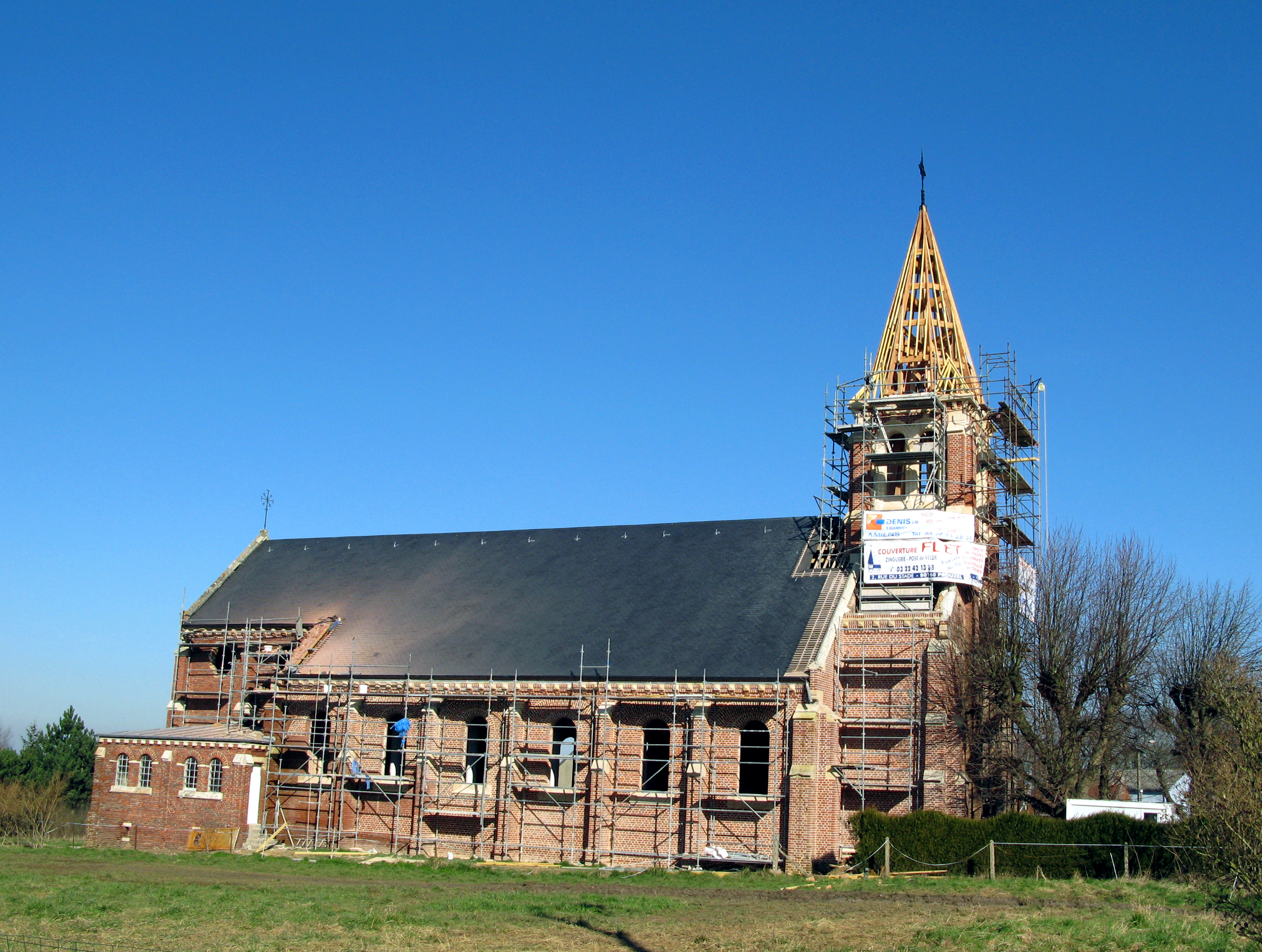 Saint-Fuscien (Somme, France) - L'église, qui est en cours de restauration en février 2008. . .